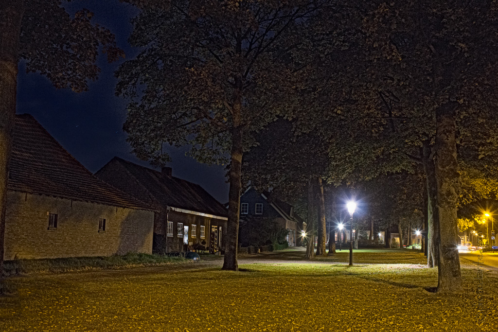 Loveren